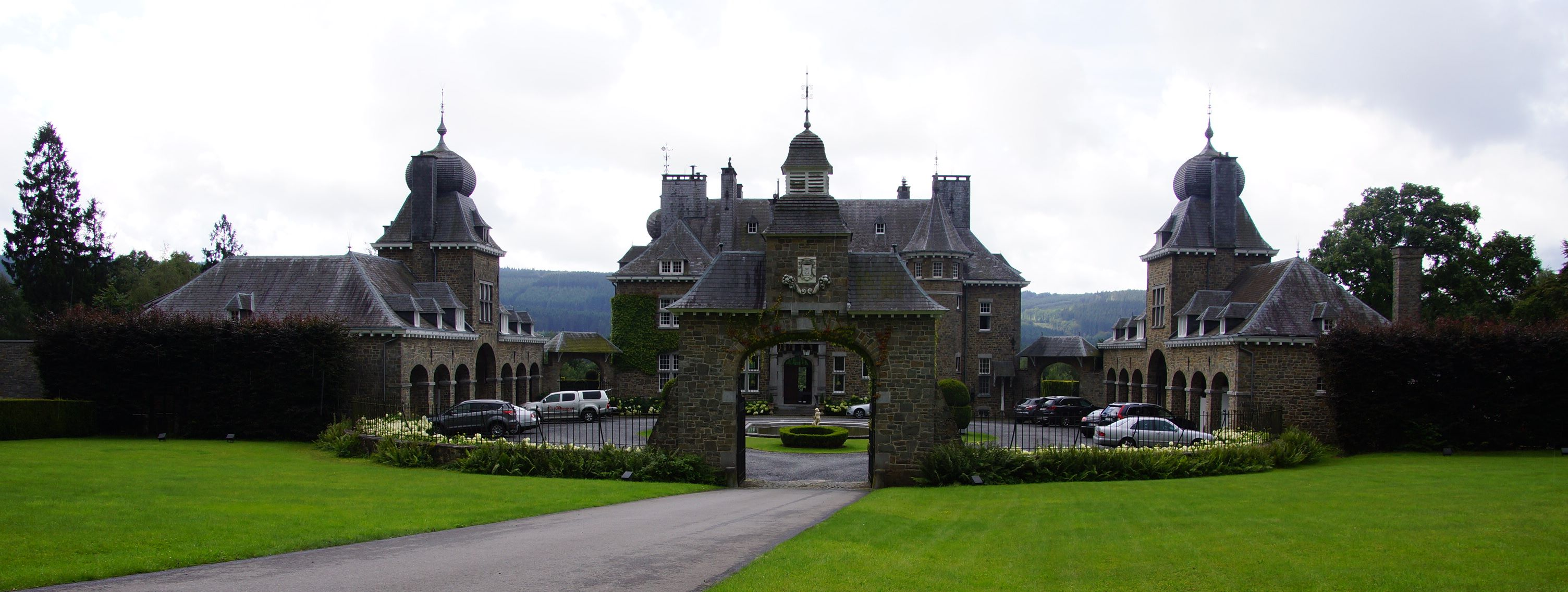 Manoir de Lébioles Domaine de Lébioles 1/5 B-4900 Spa (Creppe)